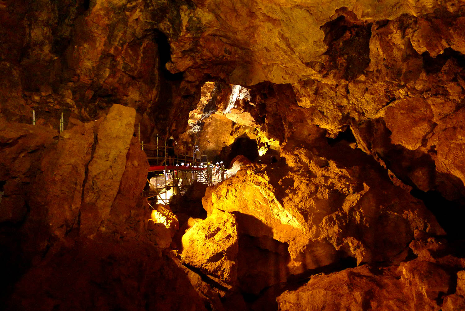 Interior de Cueva Victoria. Cartagena (Spain)